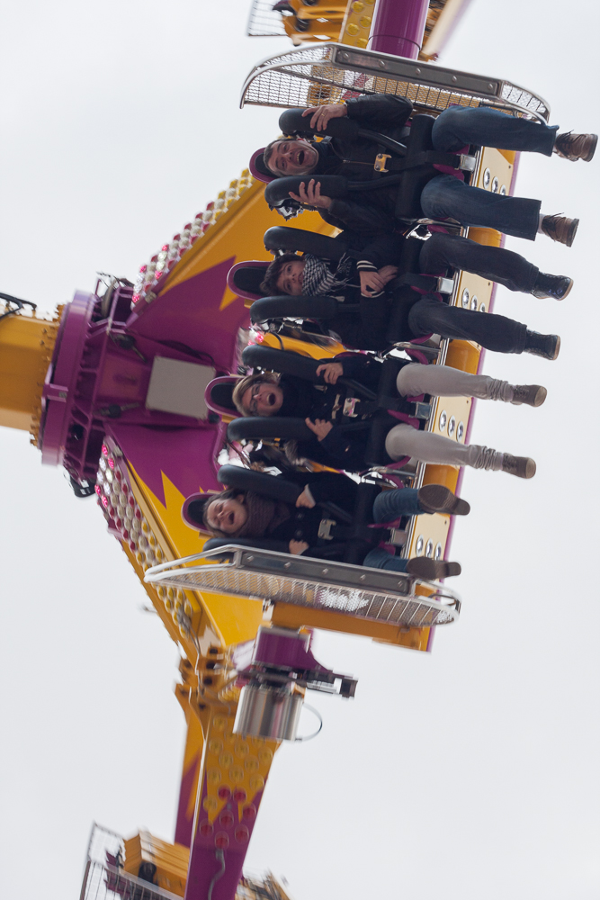 Photo d'un manège